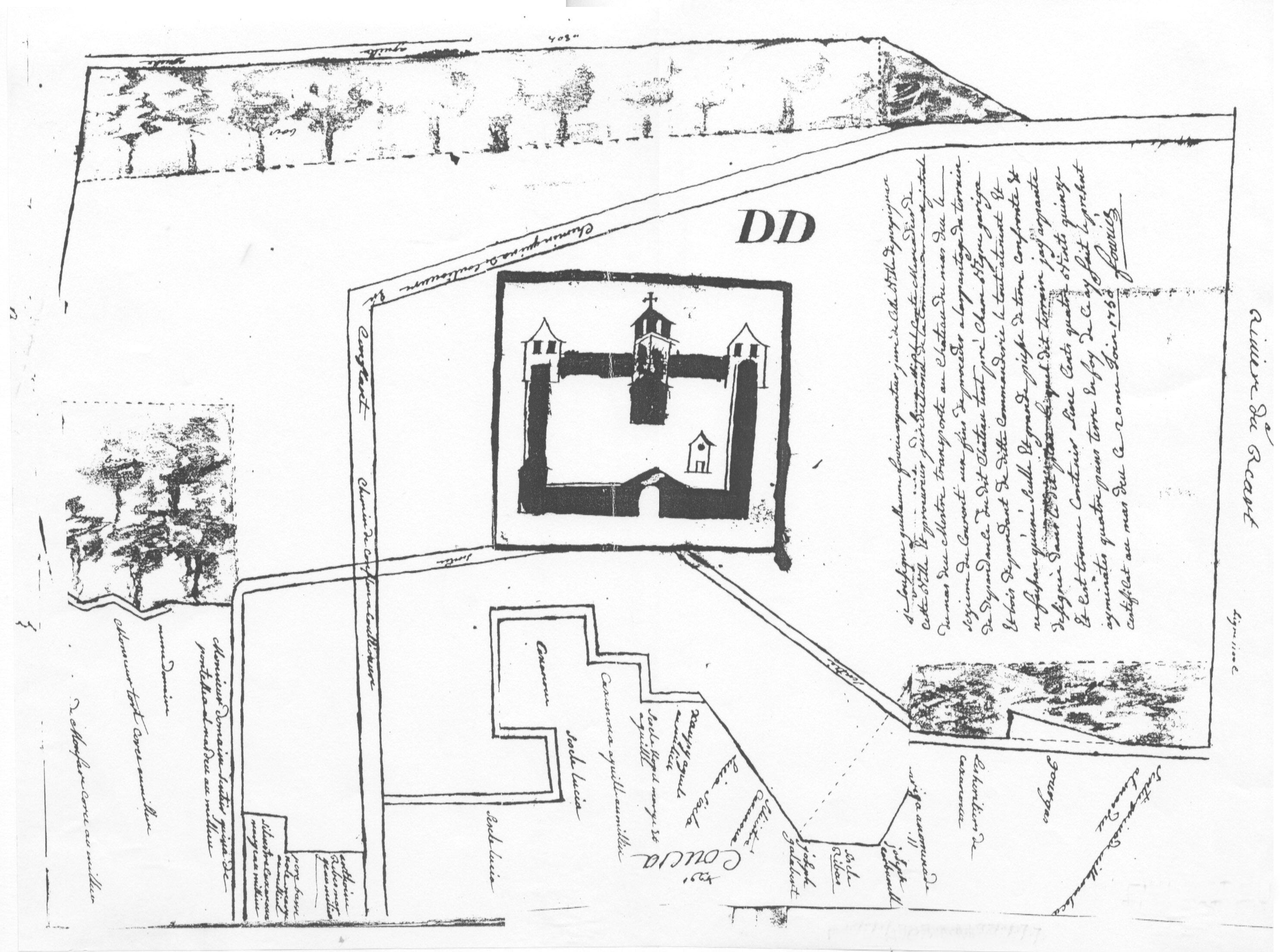 Plànol del Masdéu que acompanya la visita prioral de l'any 1751. S'hi pot veure el campanar de cadireta de l'església. (Fuguet, 1989, Apèndix Gràfic, núm. 85).